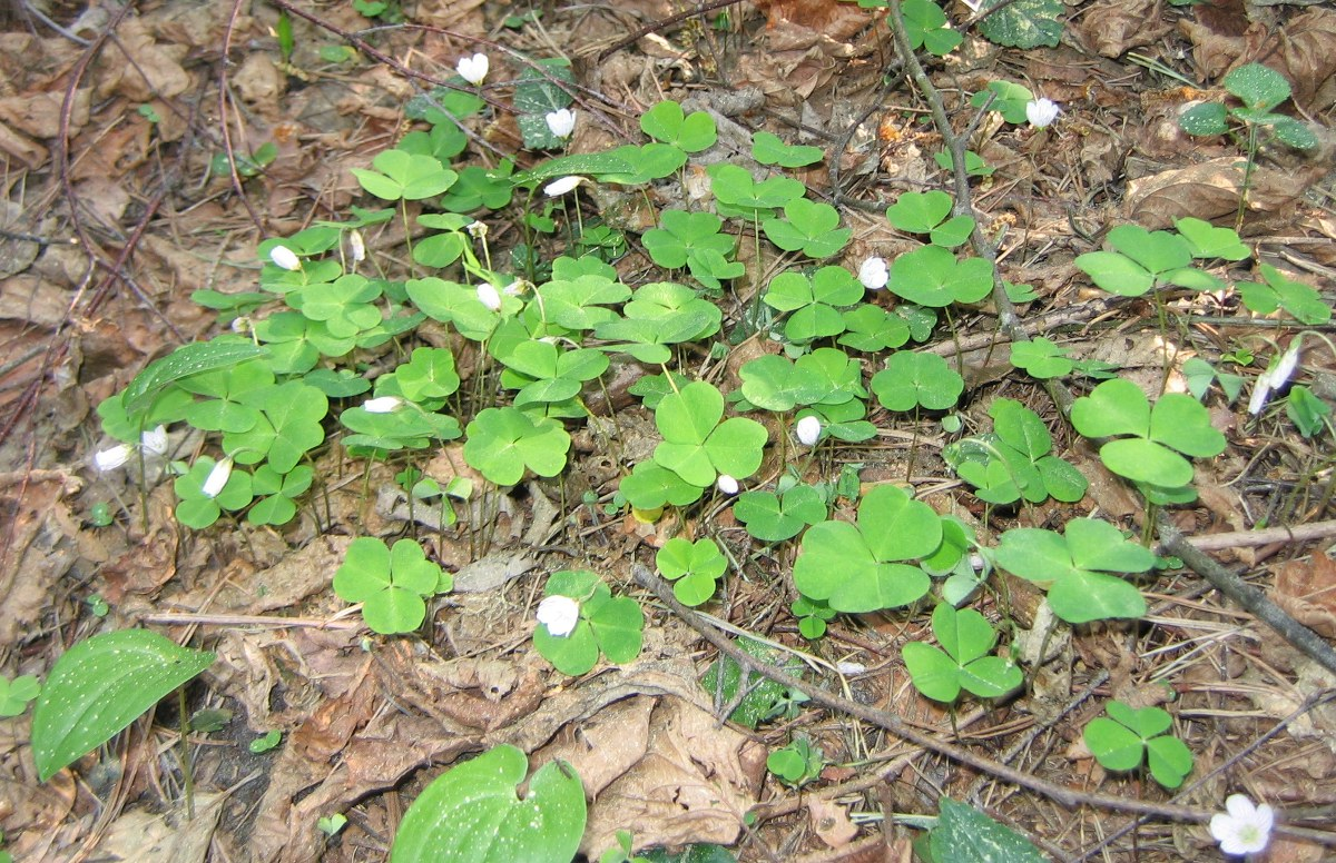 Autoriaus nuotrauka, 2006.05.13. Kiškio kopūstai žydi (Oxalis). Nuotrauka gali būti platinama pagal GFDL licenciją. (Oxalidaceae)